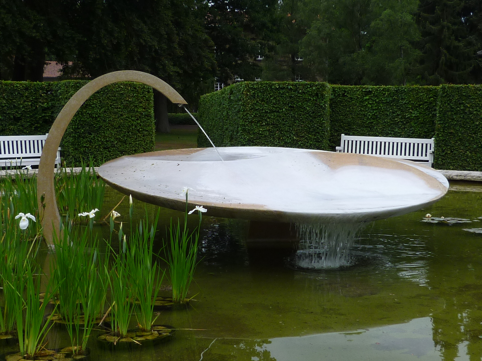 Wasserspiel im Gräflichen Park in Bad Driburg